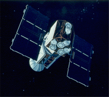 EUVE (Extreme Ultra Violet Explorer)